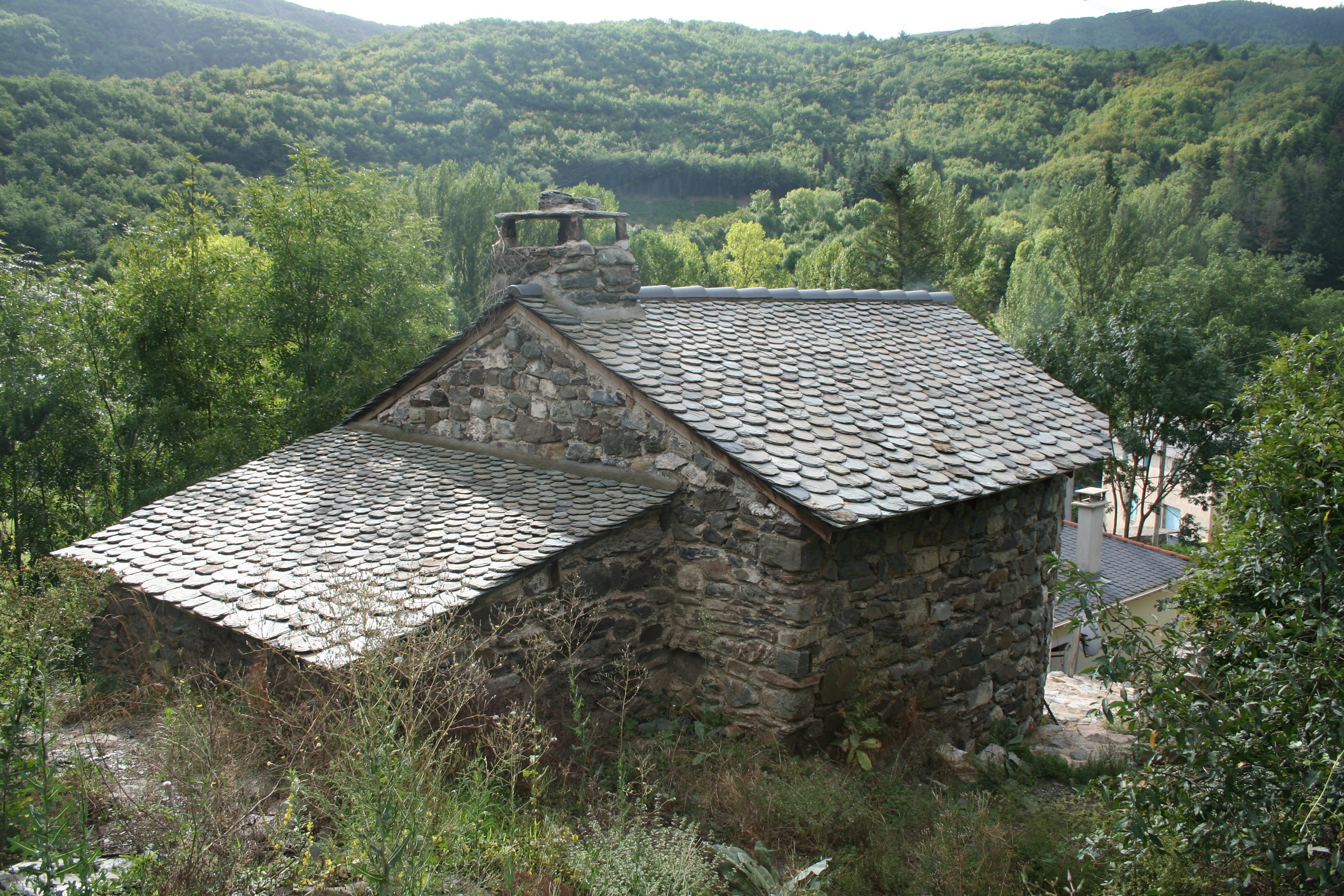 Arnac-sur-Dourdou (Aveyron) - ancien four à pain de la Mouline d'Arnac.